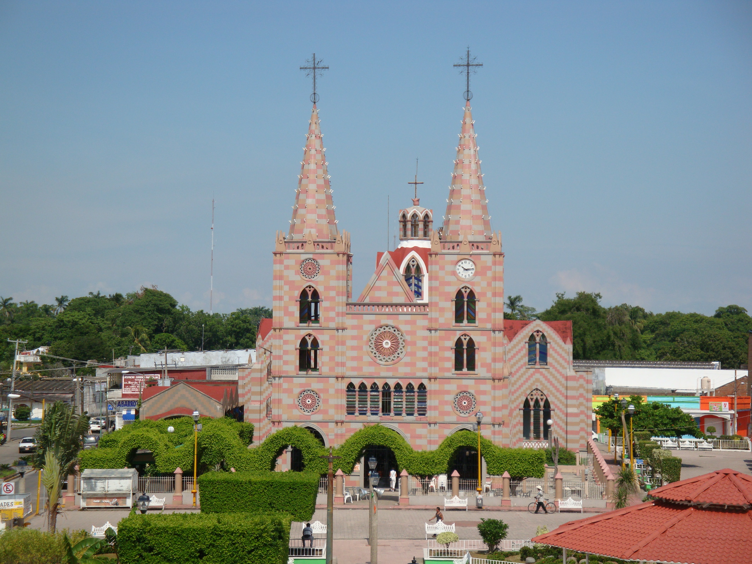 Iglesia de San Antonio de Padua, en la ciudad de Nacajuca, estado de Tabasco, México.